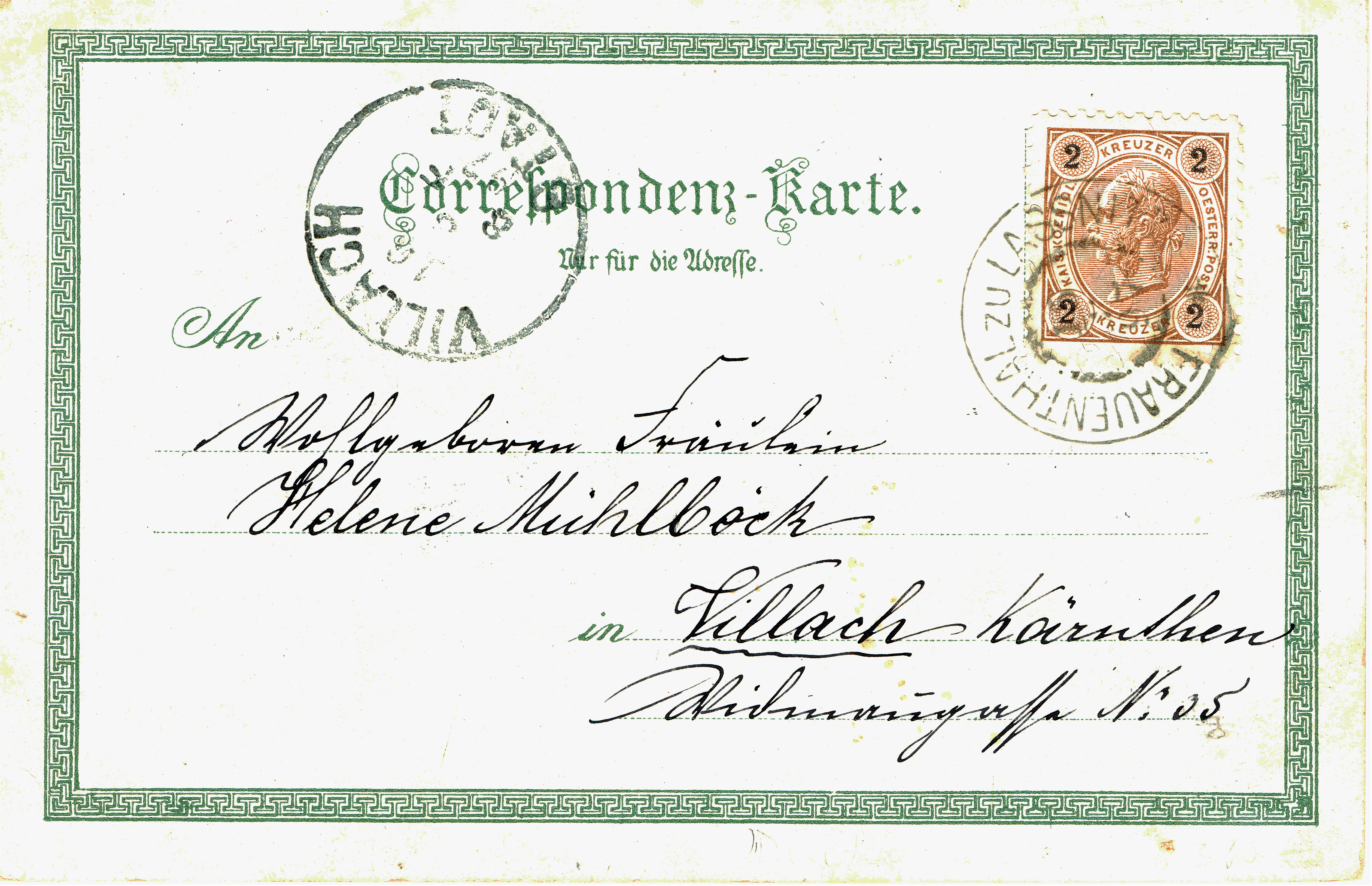 Postkarte Adress-Seite mit Stempel Frauenthal zu Lassnitz 1897